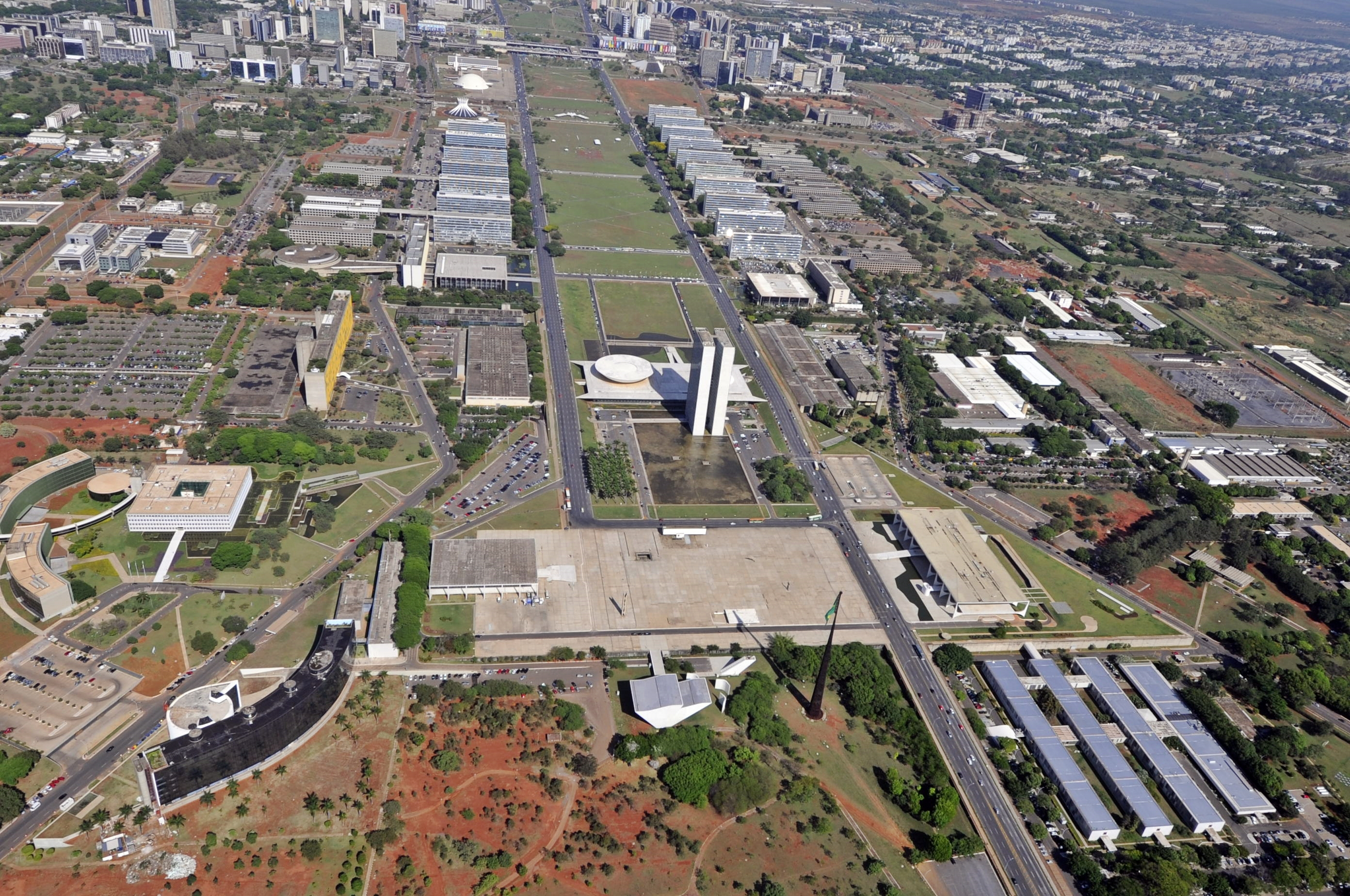 Vista aérea da Esplanada dos Ministérios em Brasília. Foto: Geraldo Magela/Agência Senado